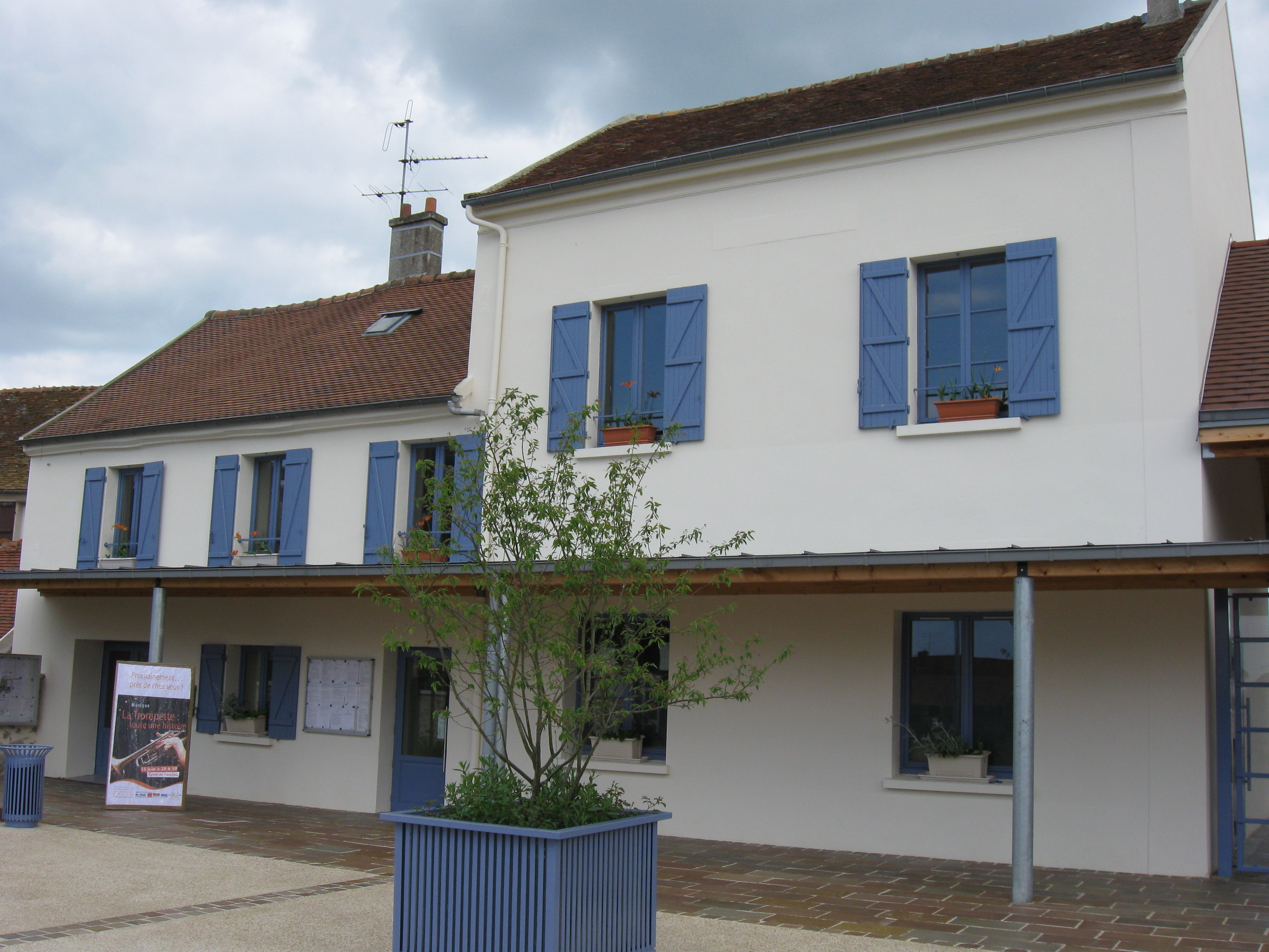 Mairie de Jaignes. (département de la Seine et Marne, région Île-de-France).